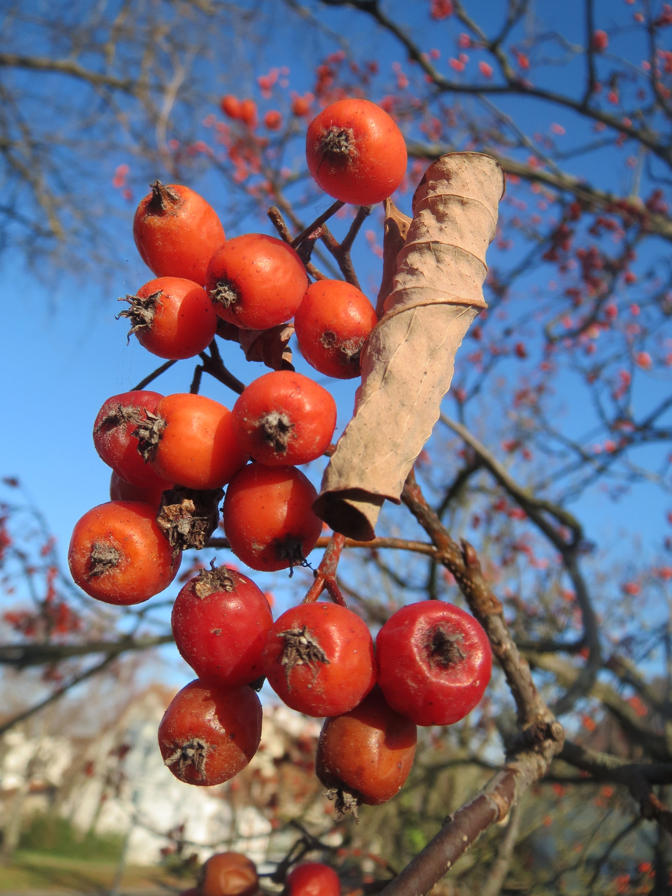 Schwedische Mehlbeere (Sorbus intermedia) in Hockenheim